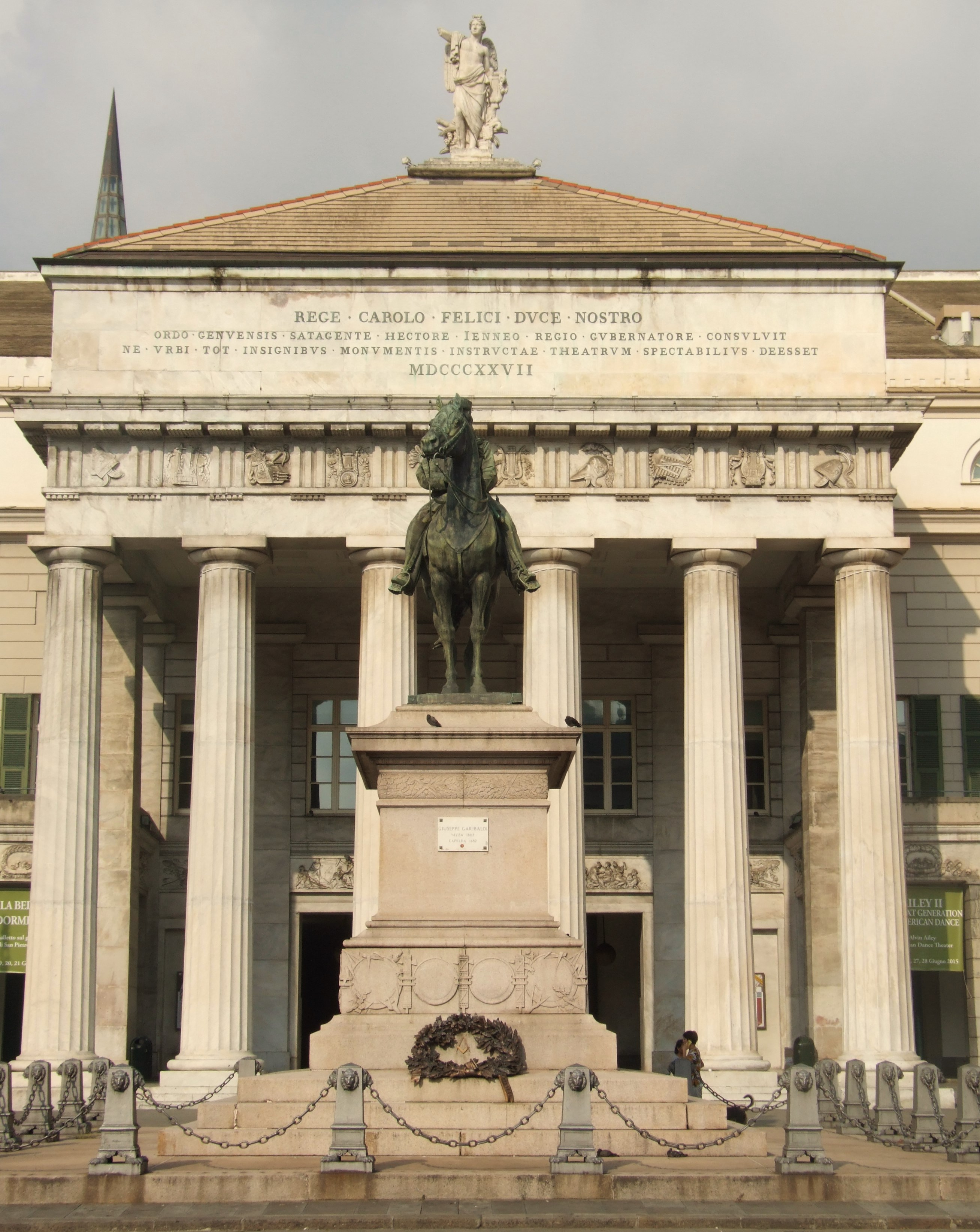 Teatro Carlo Felice This is a photo of a monument which is part of cultural heritage of Italy.